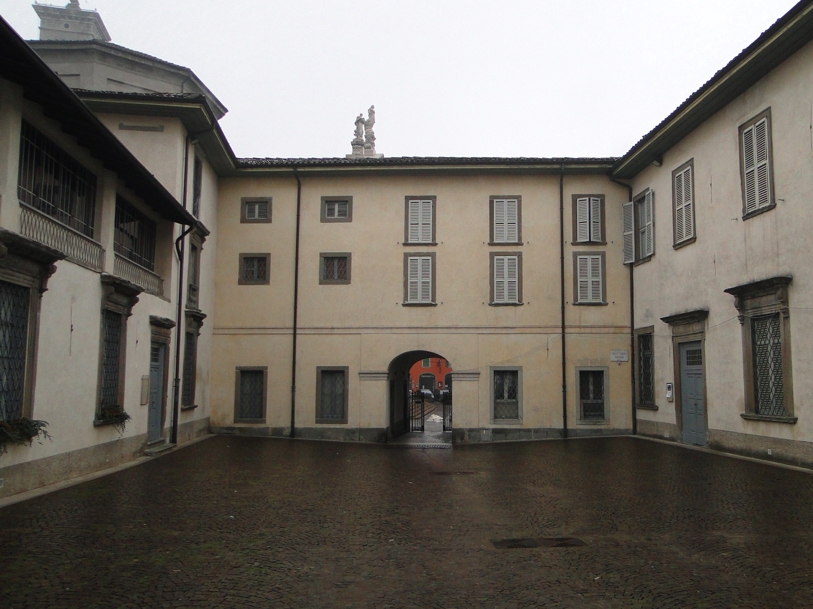 Alzano Lombardo (BG), Italy. Palazzo sede del Museo di Arte Sacra